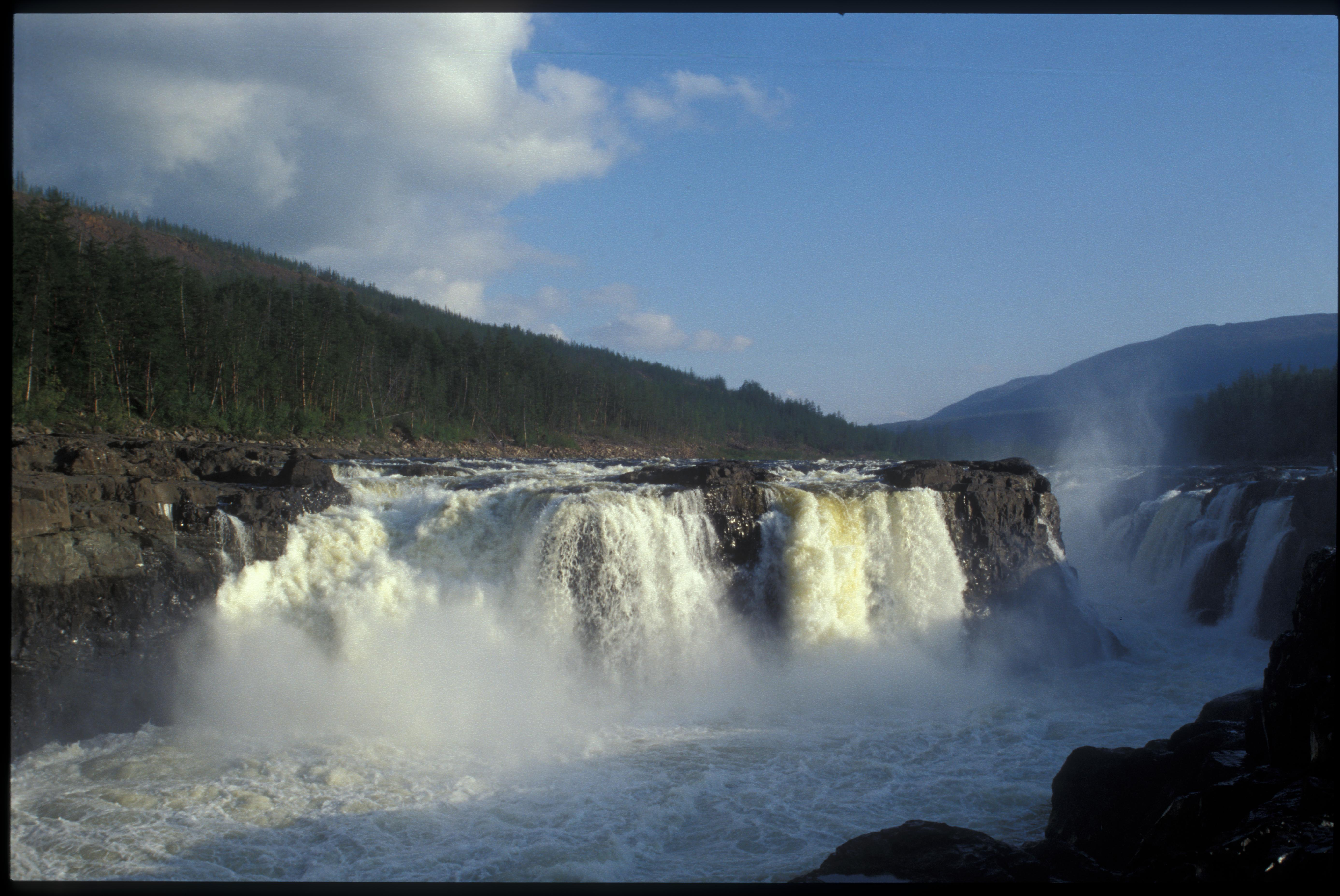 Путоранский заповедник, This image is related to the protected area of Russia number 2400003